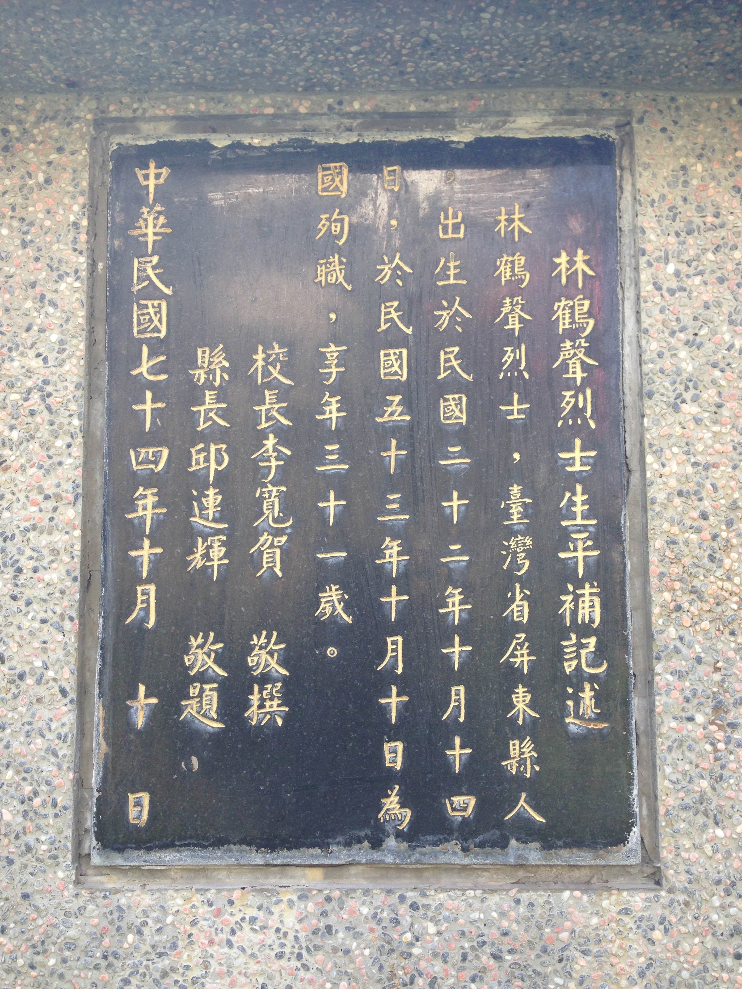 中文（台灣）: 銅像基座的林鶴聲烈士生平補記述